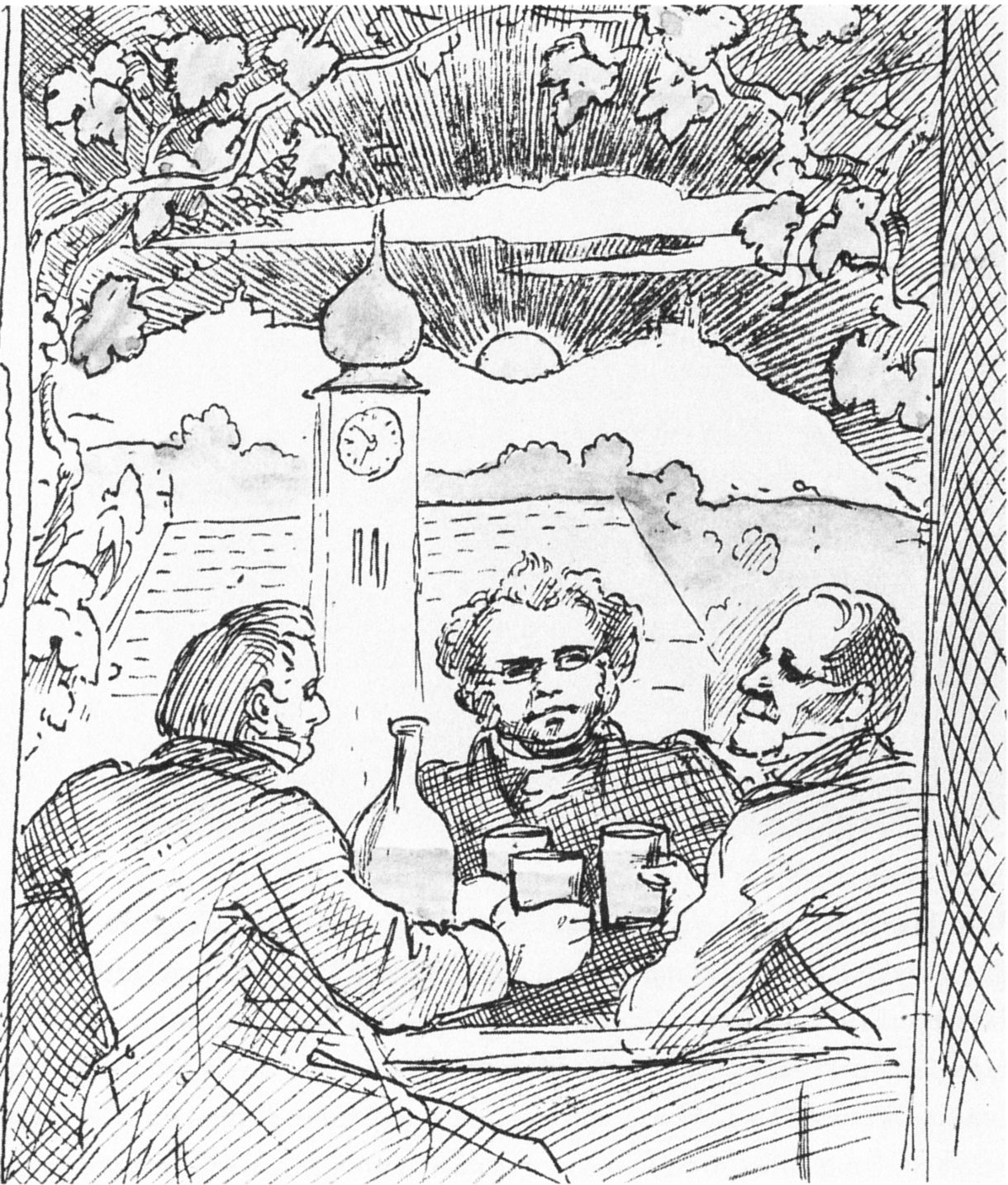 Franz Lachner (links), Franz Schubert (mitte) und Eduard von Bauernfeld (rechts) beim Heurigen.